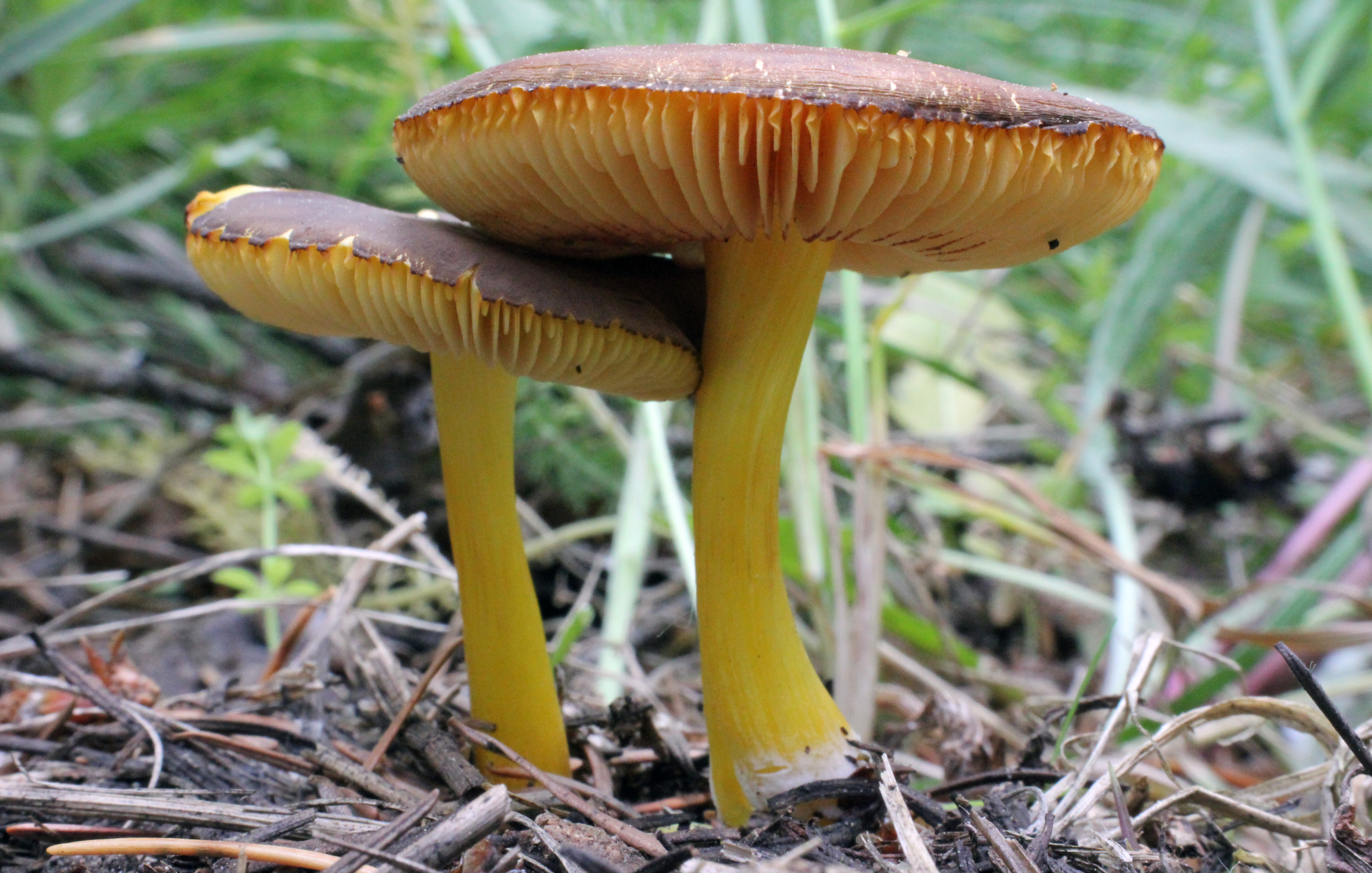 Pluteus romellii (Britzelm.) Lapl.